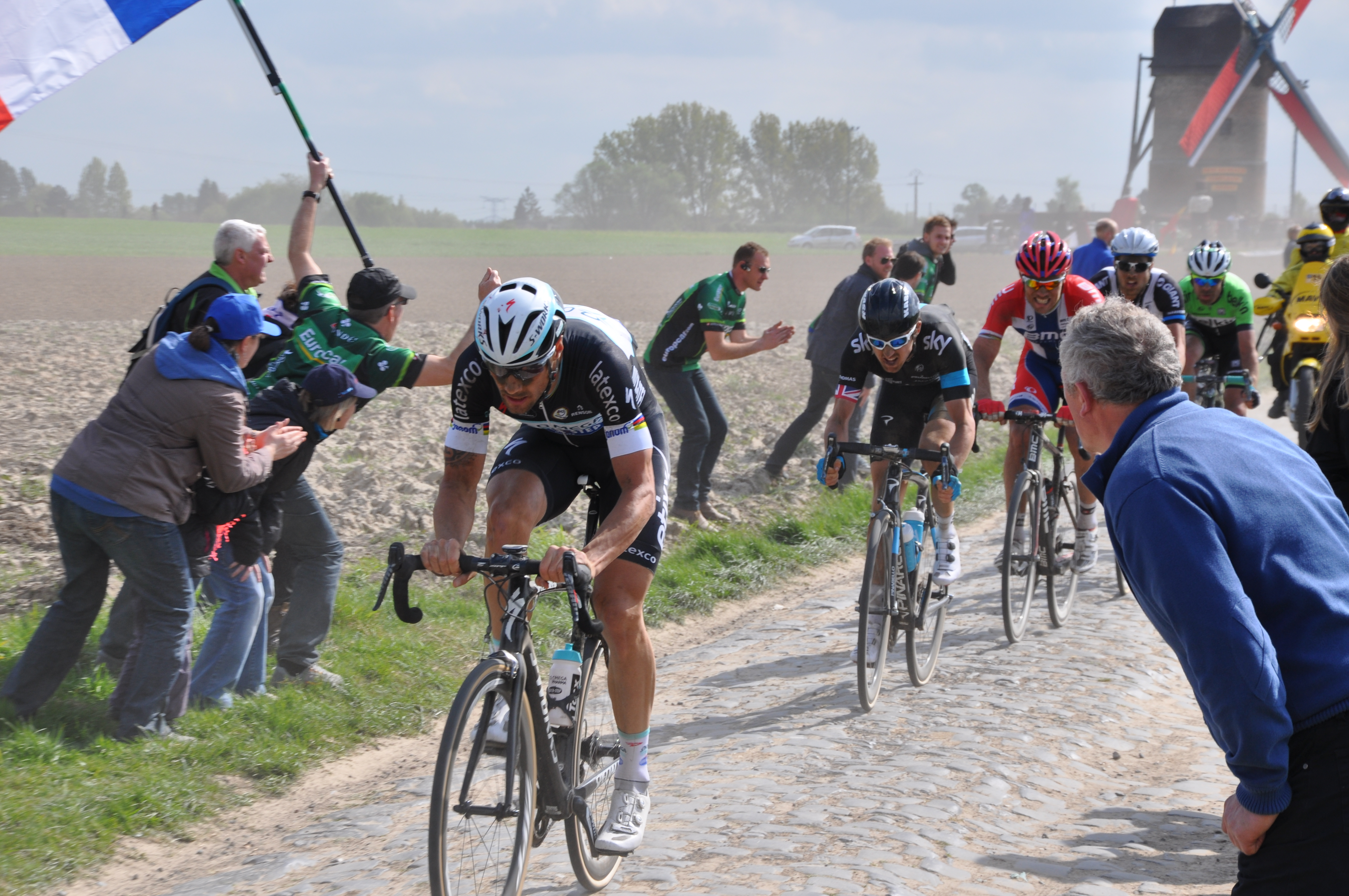 Paris Roubaix 2014, à Templeuve, tête de la course Depicted people: Tom Boonen, Geraint Thomas, Thor Hushovd, Bert De Backer and Bram Tankink